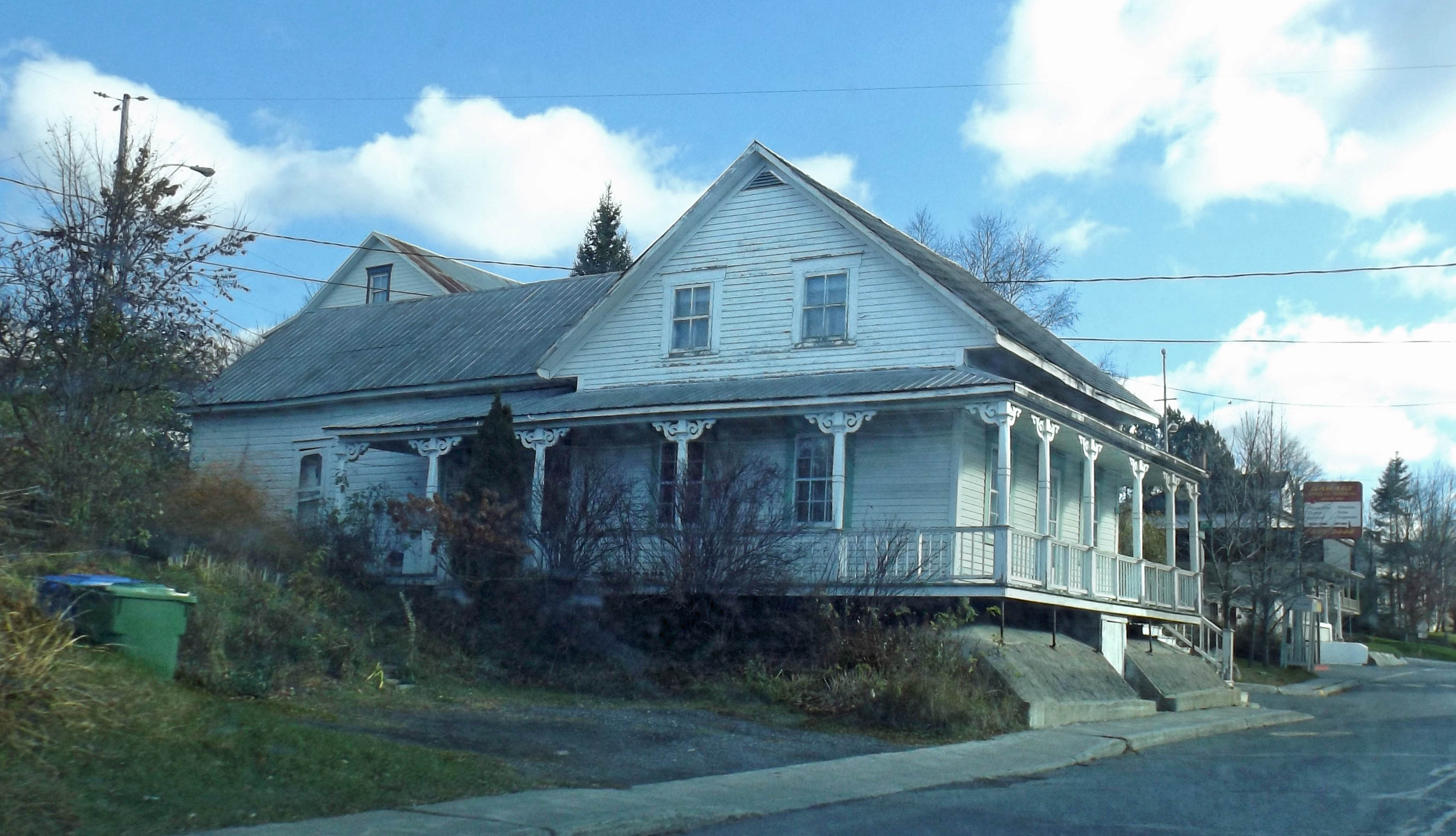 Ancienne maison de Saint Come Linière